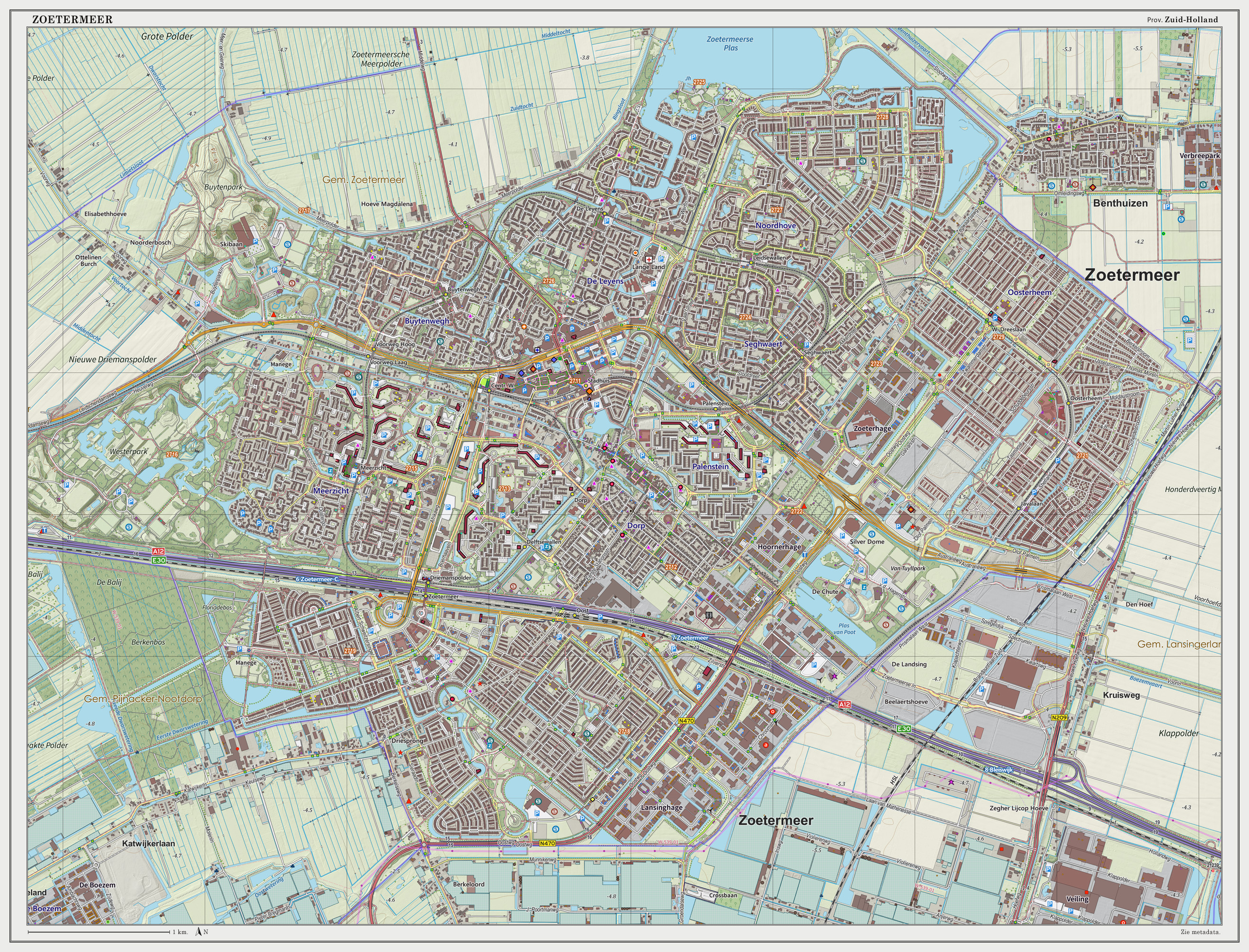 Topografische kaart van Zoetermeer (woonplaats). Resolutie: 300 pixels/km. Kaartbeeld samengesteld uit de open geodata van de Top10NL en Top25namen (Basisregistratie Topografie, Kadaster), Creative Commons BY licentie. Gebouwvlakken uit open geodata BAG extract. Wegen uit de OpenStreetMap. Reliëfschaduw uit de Actuele Hoogtekaart AHN2. Samenstelling en kleurenschema: Jan-Willem van Aalst, met QGIS2. Zie ook de Legenda.